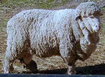 Cormo ram